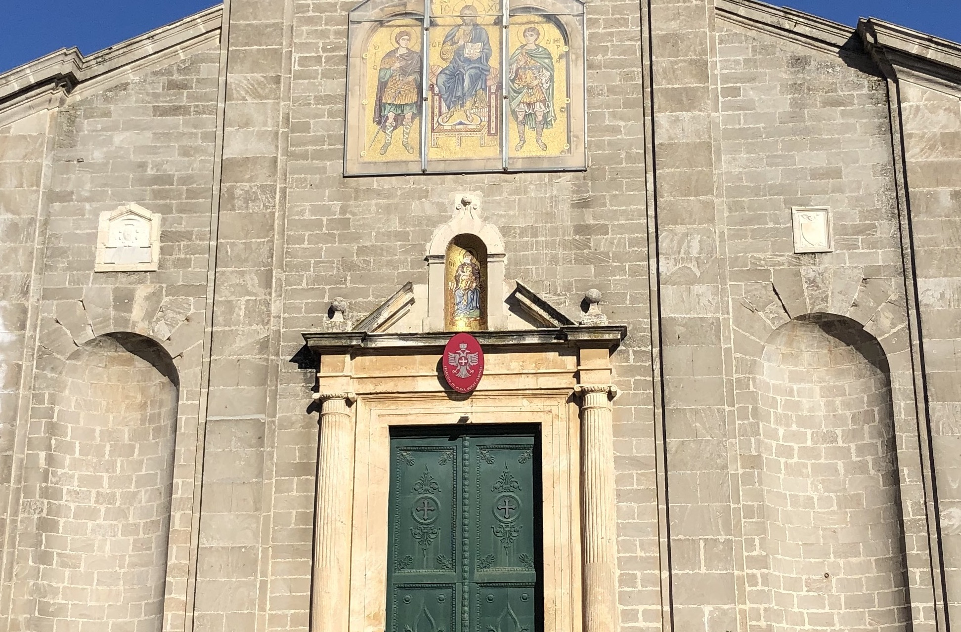 San Demetrio Megalomartire